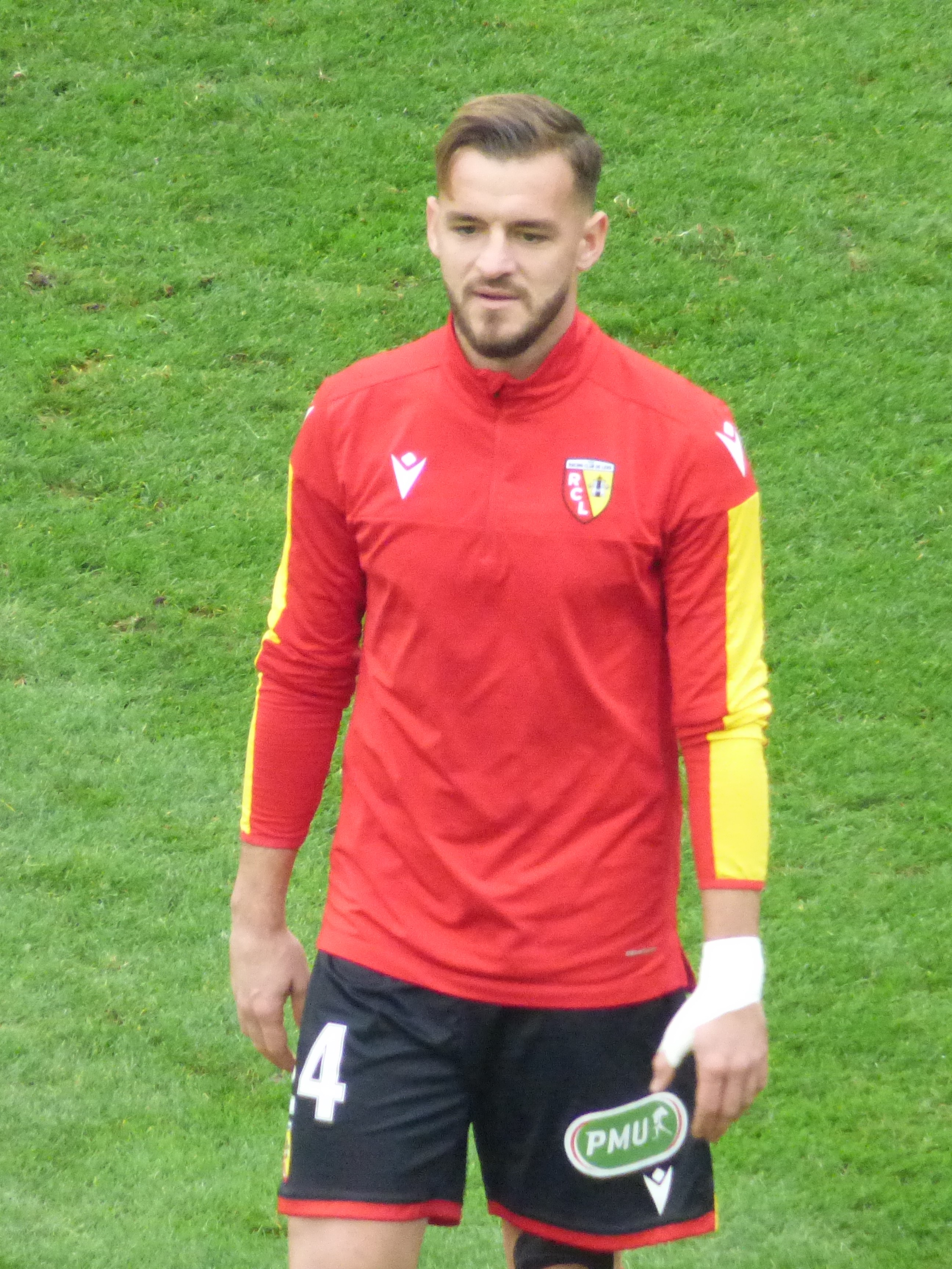 Jonathan Gradit avant le match RC Lens / FC Sochaux, comptant pour la quinzième journée du championnat de France de Ligue 2 de football 2019-2020, le 23 novembre 2019, au Stade Bollaert-Delelis.